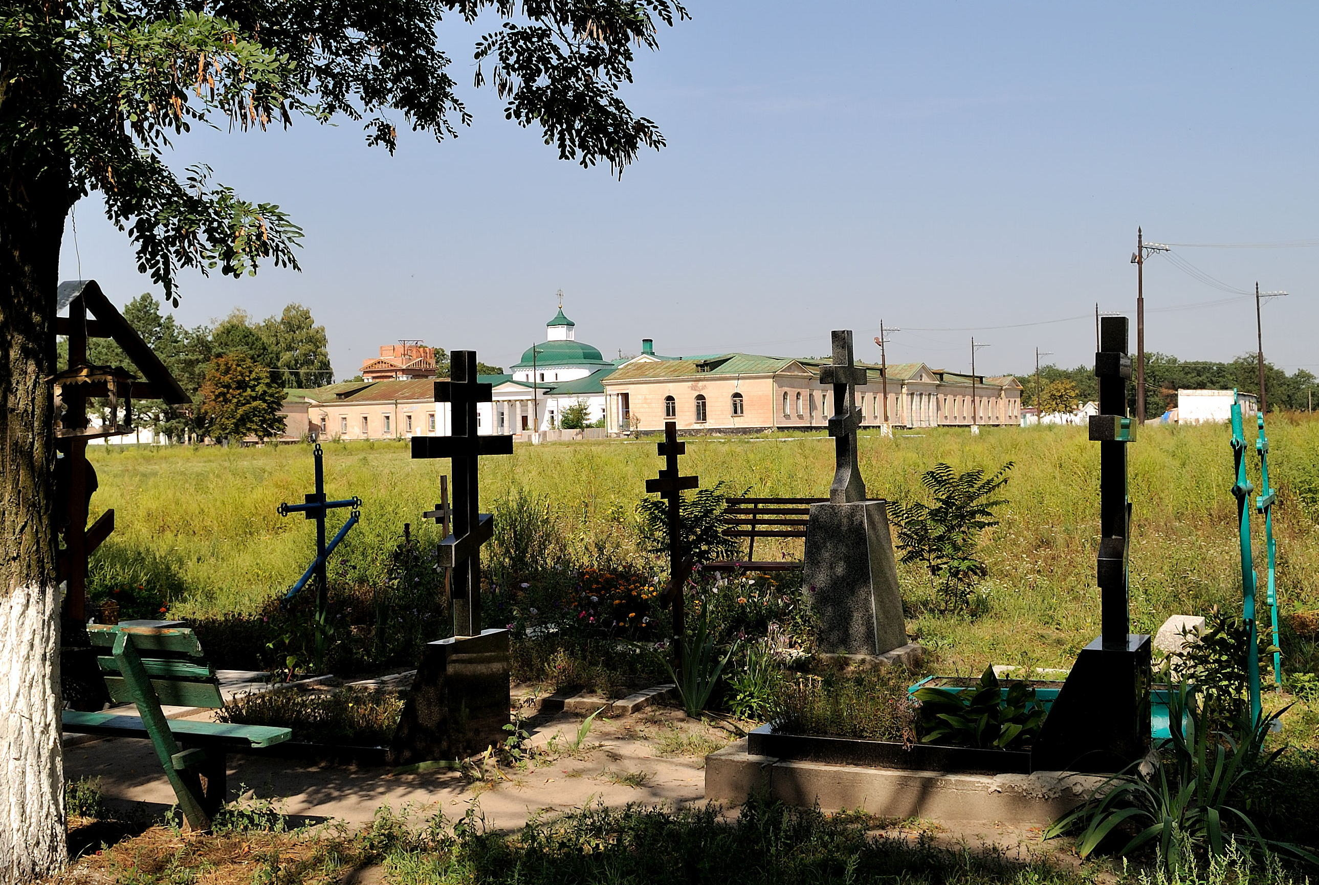 Пустельно-Миколаїв-ський Самарський монастир (мур.):, Новомосковськ